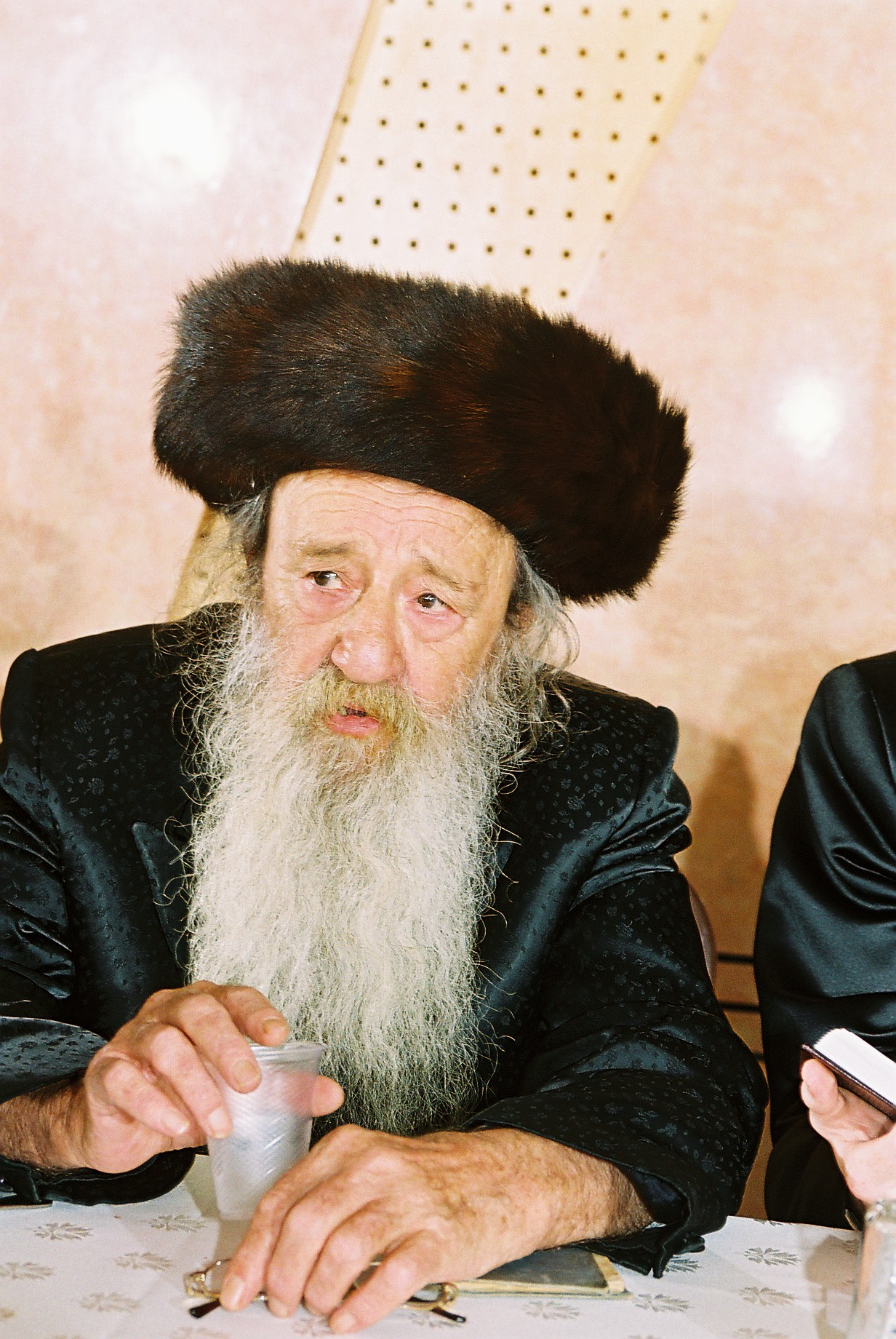 משה יעקב וייס